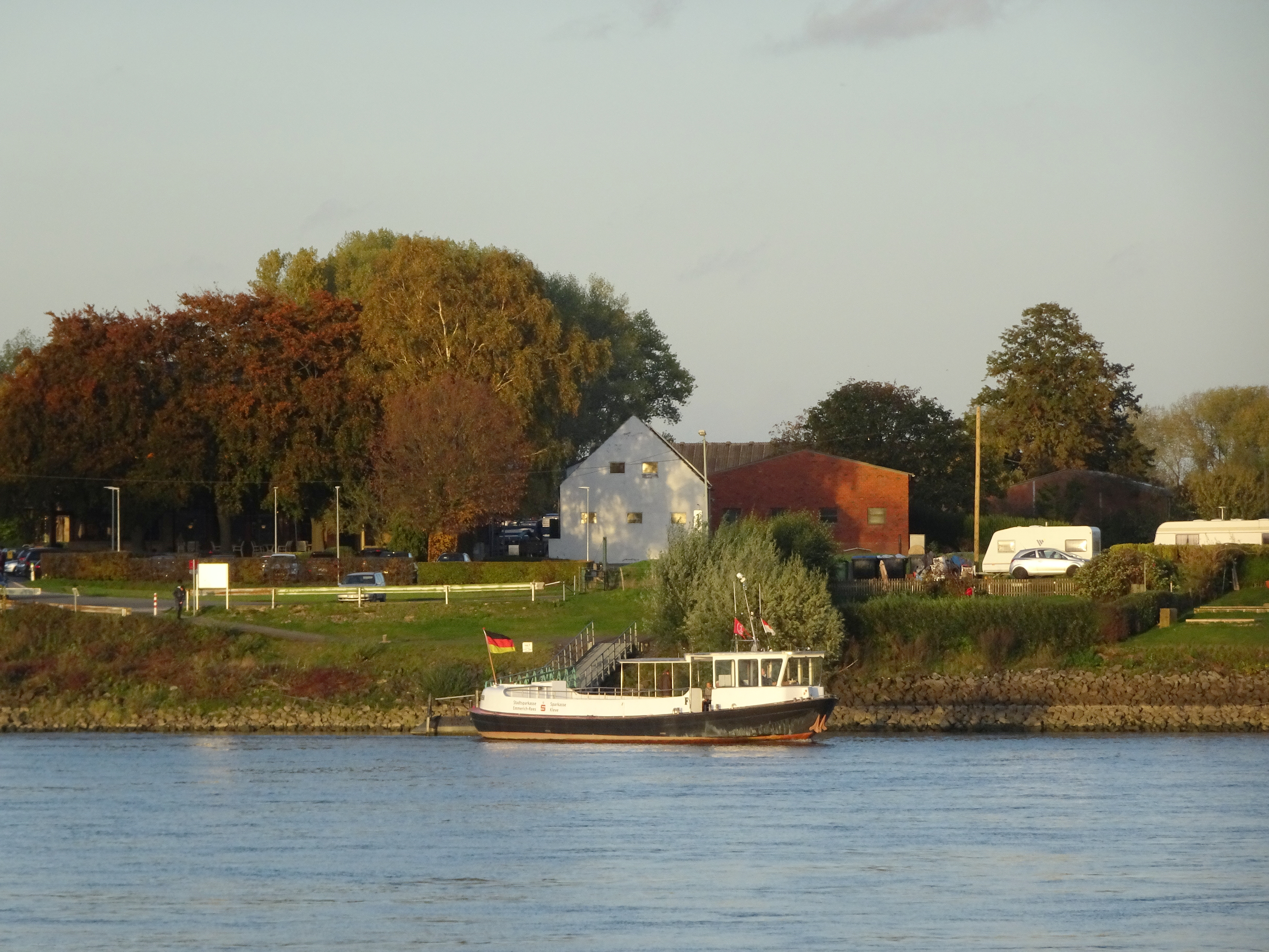 Kalkar.Grieth, fietspont Inseltreue vaart in de zomer op de Rijn tussen Grieth en Grietherort